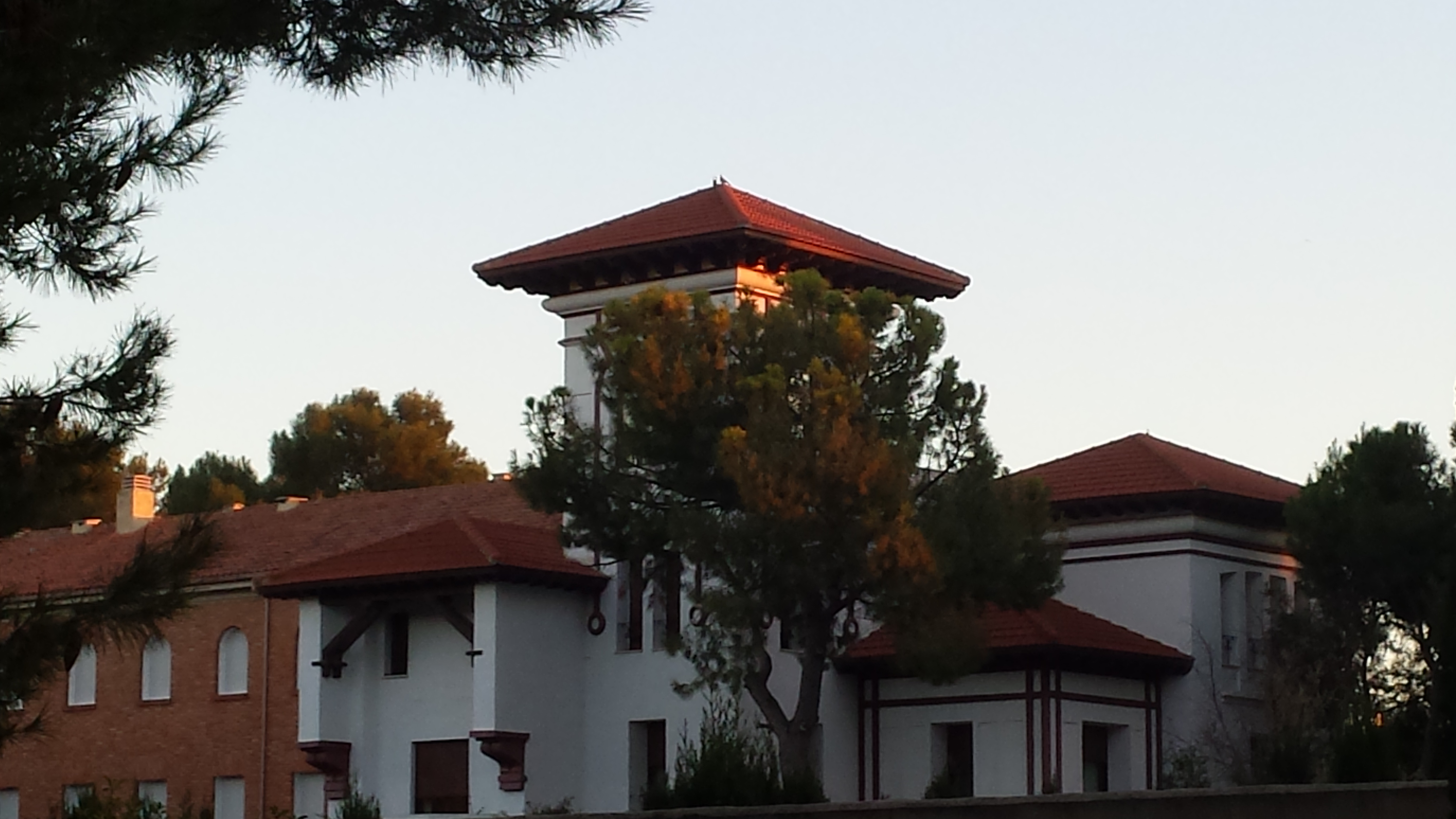 Casa de Ejercicios de Albacete